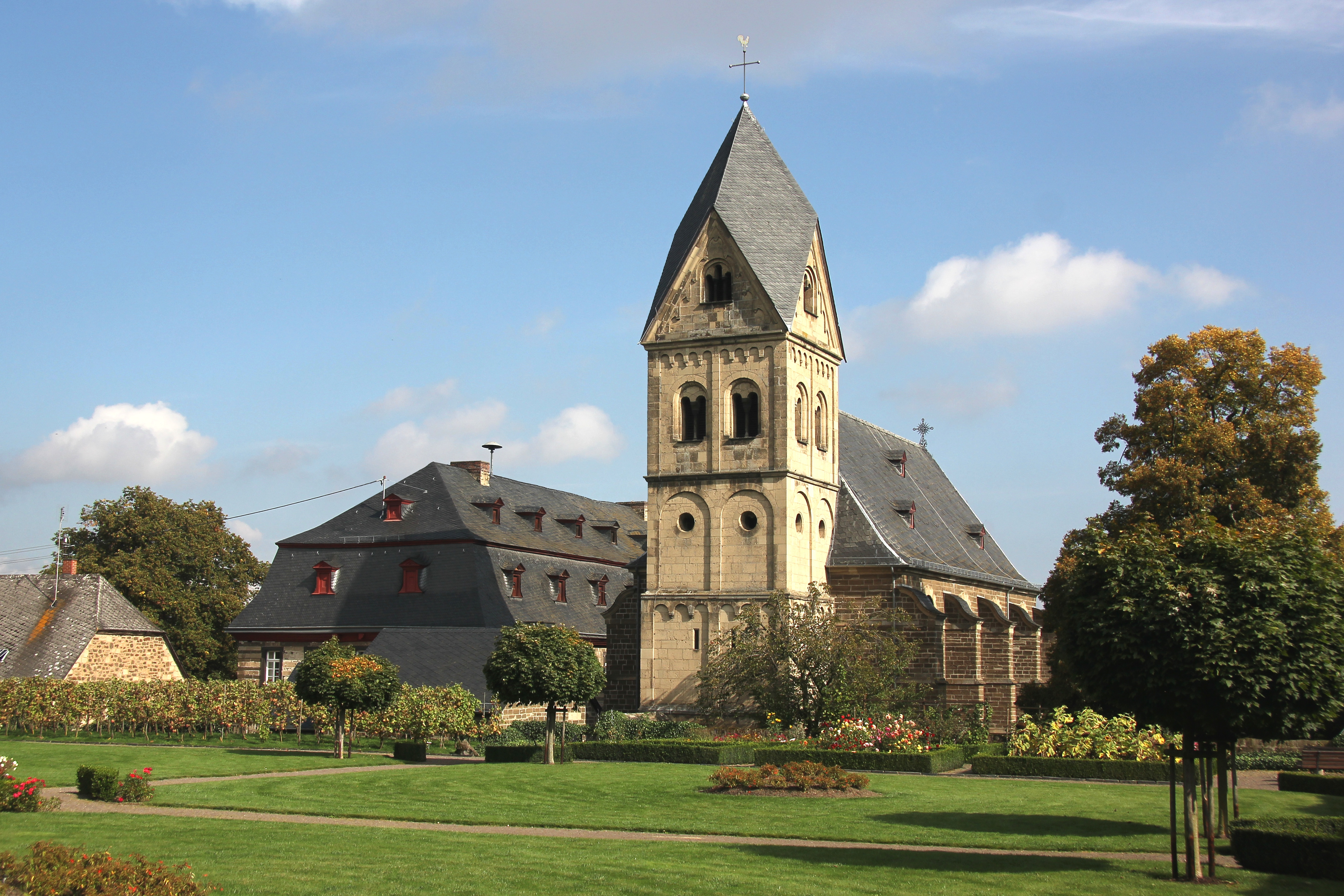 Pfarrkirche St. Potentinus in Wehr (Eifel), davor der hoch gelegene Barockgarten. Der spätromanische Turm wurde in der Zeit zwischen 1220 und 1240 erbaut, das barocke Langhaus 1702 fertiggestellt. Links neben der Kirche das Propsteigebäude von 1730